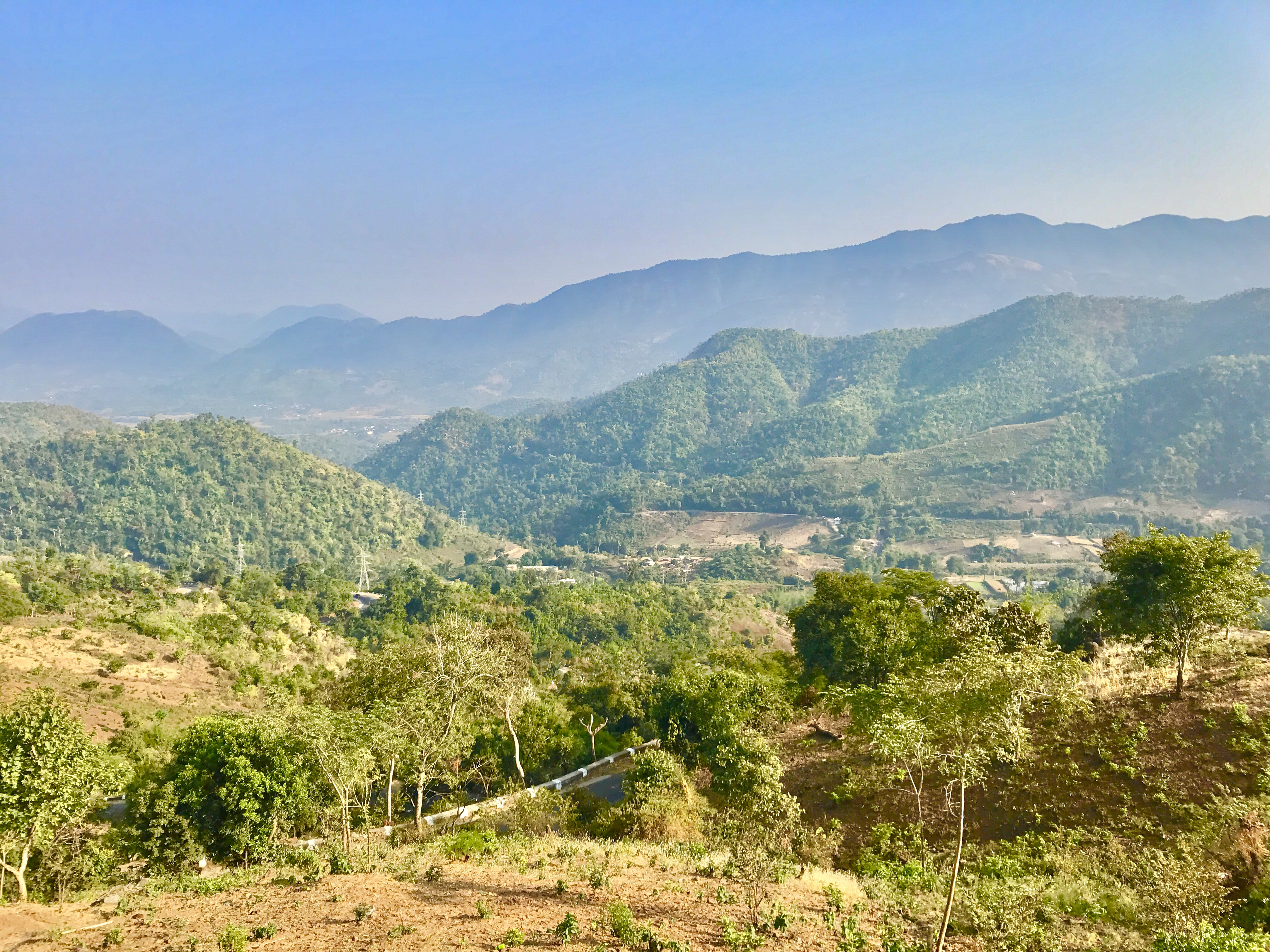 Anantagiri Hills in Araku Valley